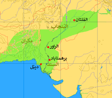 خريطة تُصوِّرُ أقصى ما بلغته الفُتُوحات الإسلاميَّة بِقيادة مُحمَّد بن القاسم في شمال غرب الهند حوالي سنة 711م.